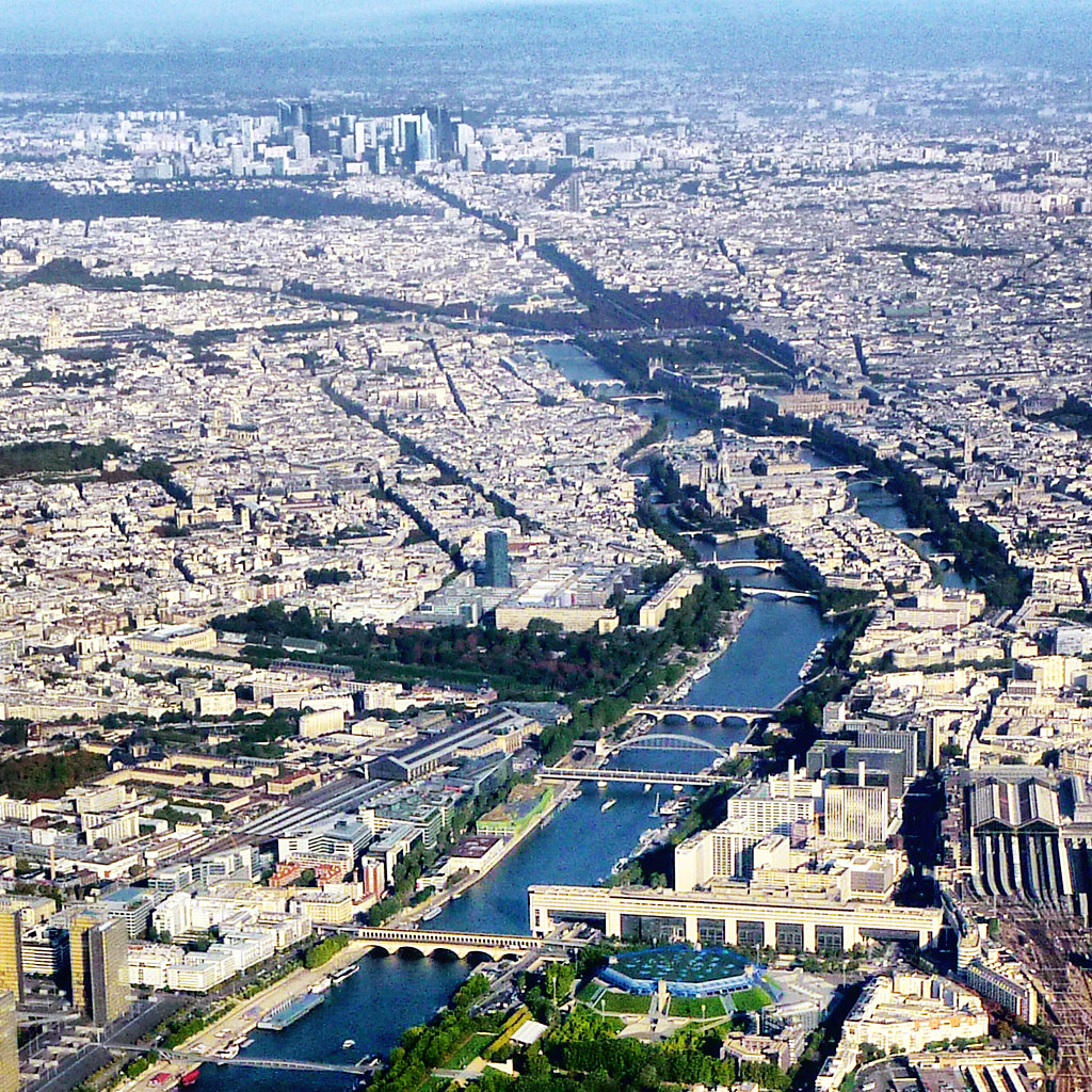 Paris